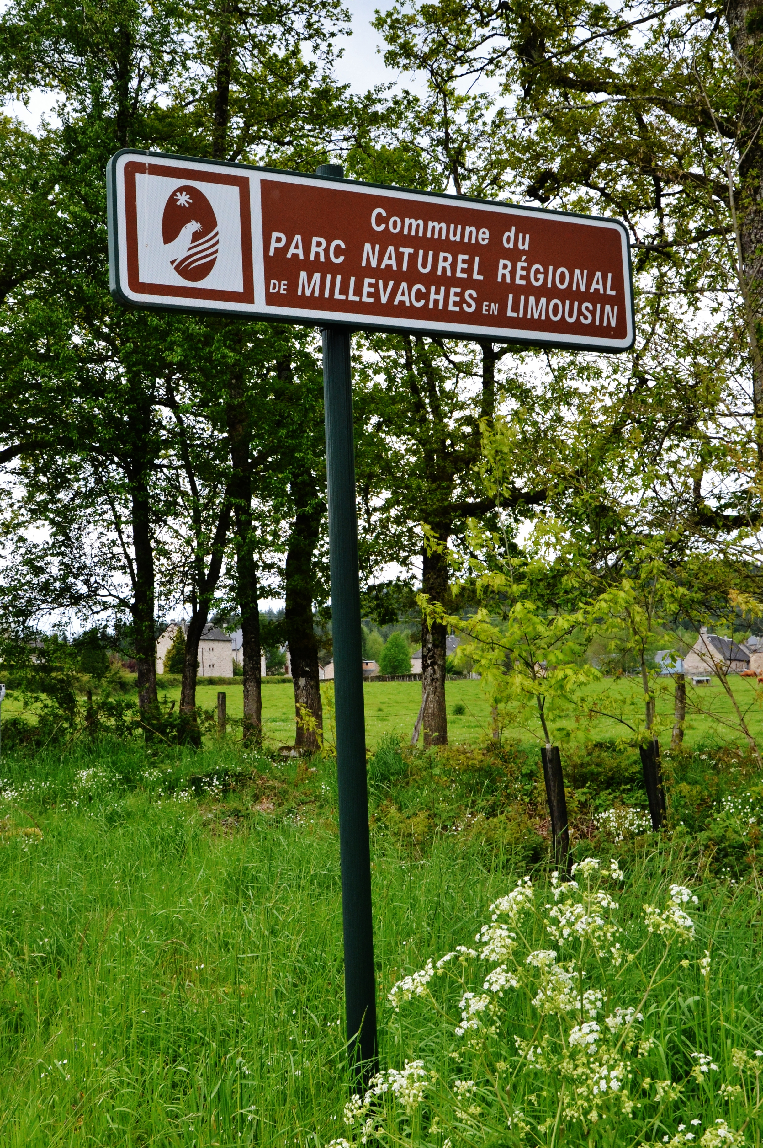 Panneau signalant l'entrée dans une commune adhérente du Parc naturel régional de Millevaches en Limousin